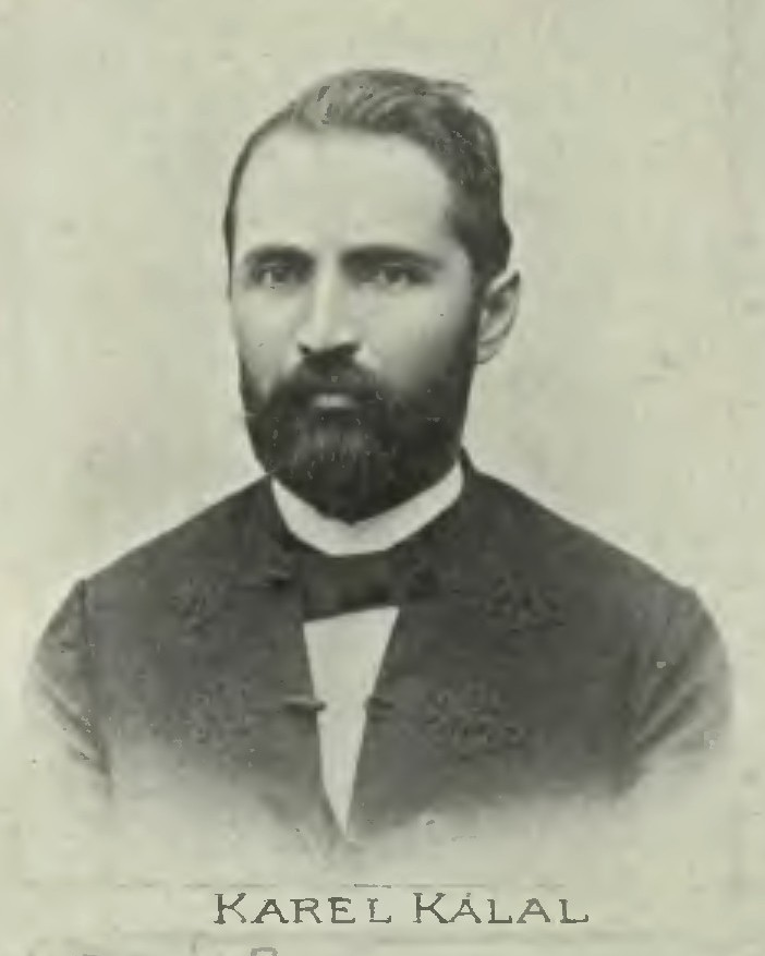 Portrét – Karel Kálal (1860 - 1930), Český učitel a spisovatel.